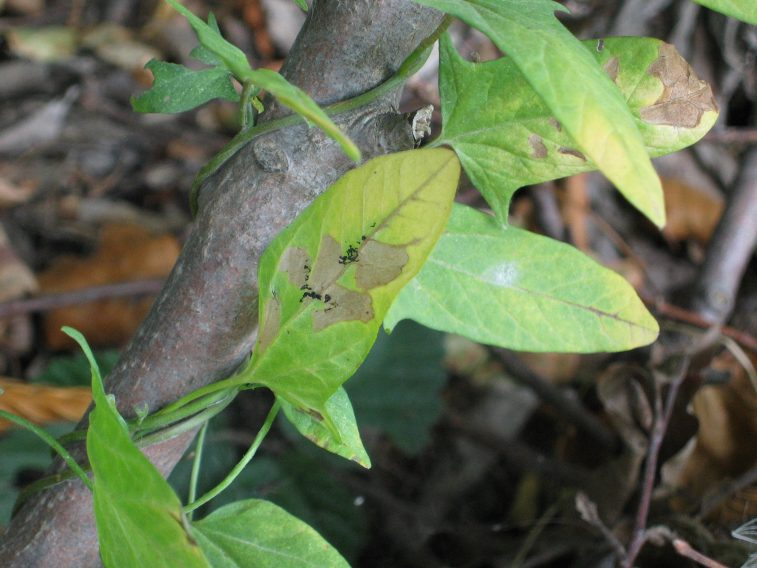 Mine von Bedellia somnulentella